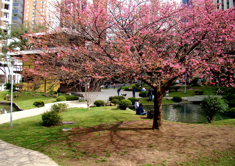 Florada das cerejeiras-do-japão na Praça do Japão em Curitiba, PR, Sul do Brasil.